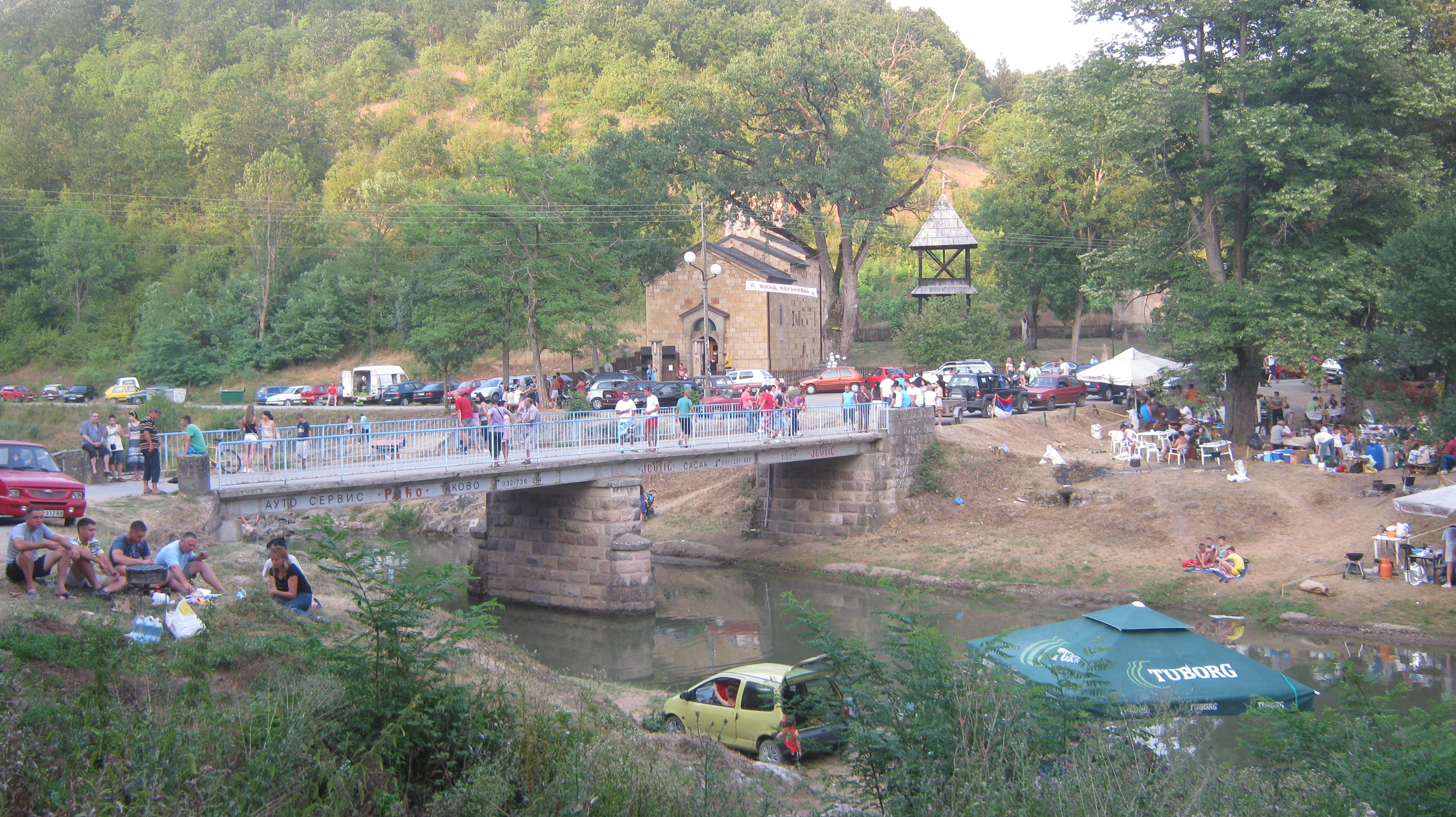 Srpski (latinica): Savinački dani 2012. godine.